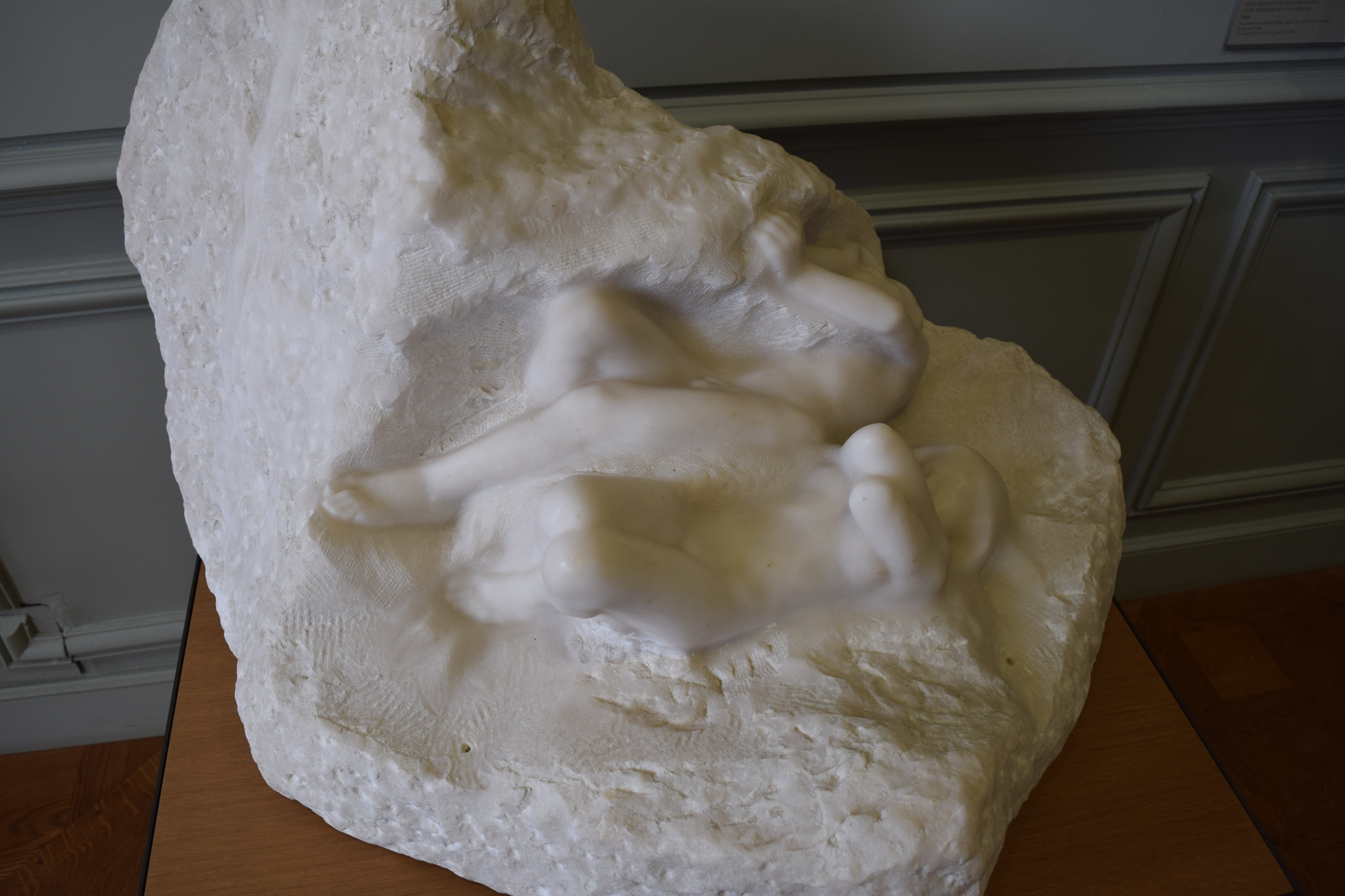 Adan y Eva en el museo Rodin